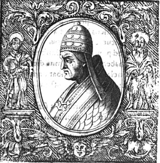 Innocentius IV